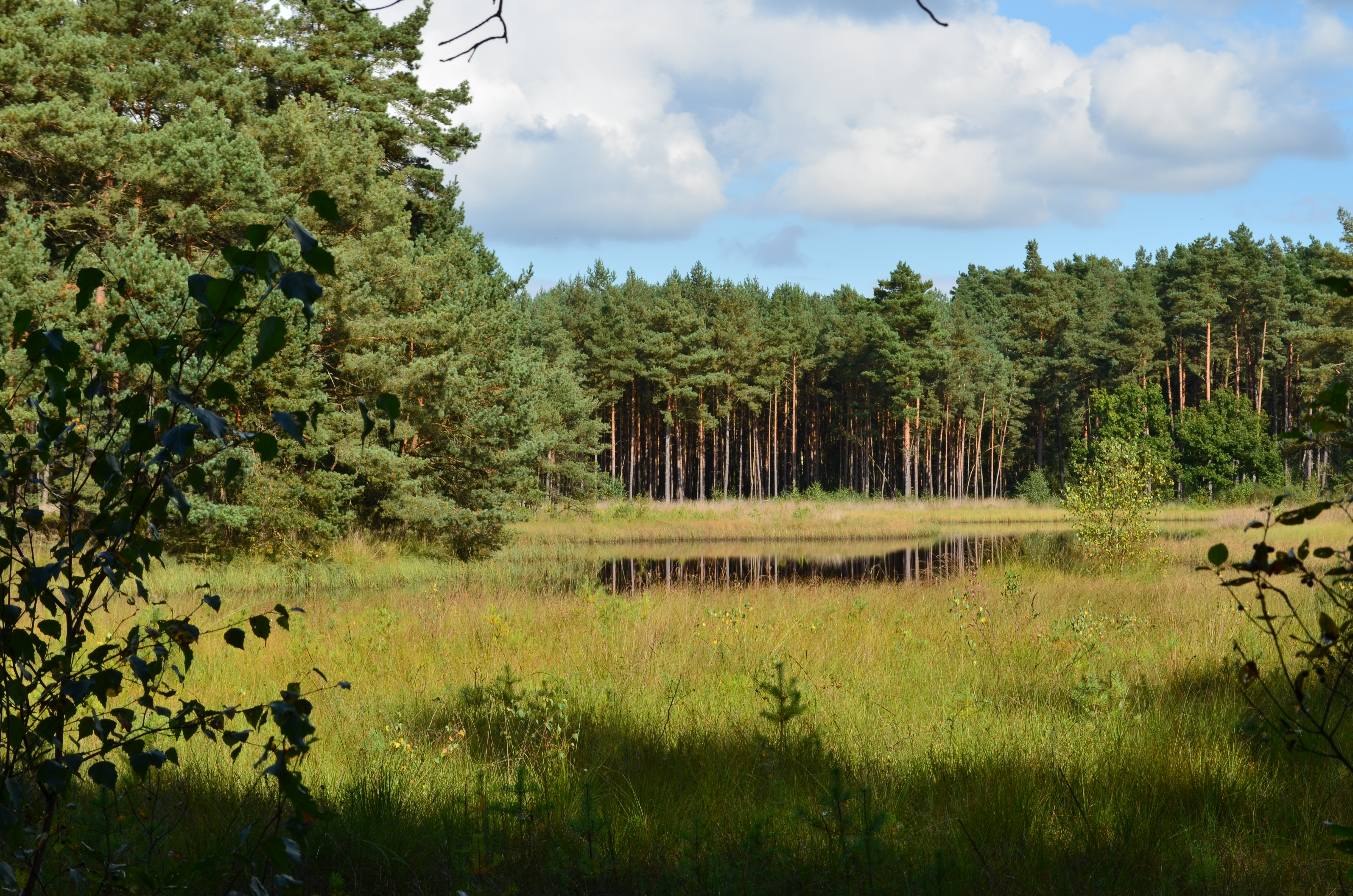 Naturschutzgebiet Bansee bei Hademstorf, Niedersachsen, Deutschland